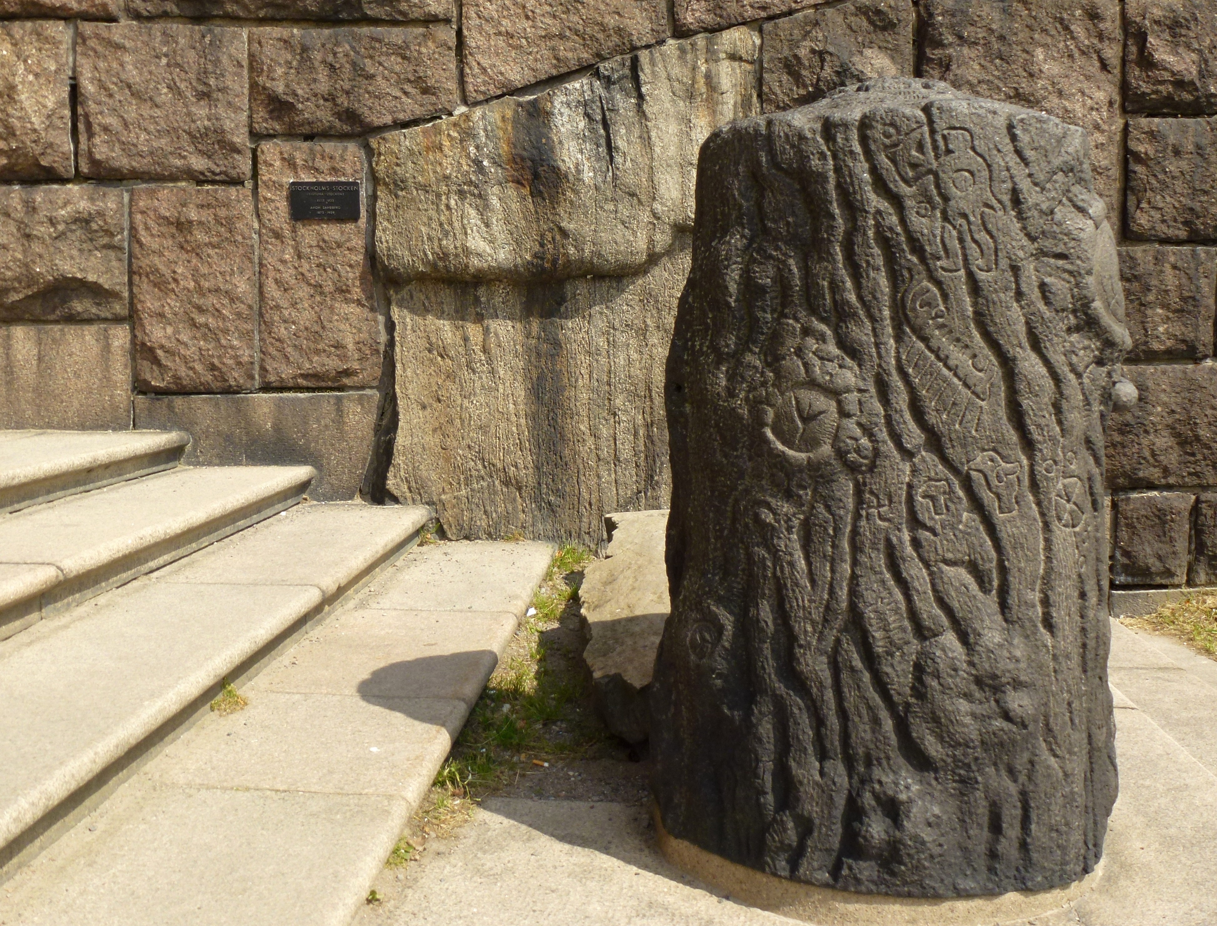 Stockholmsstocken / Sigtunastocken